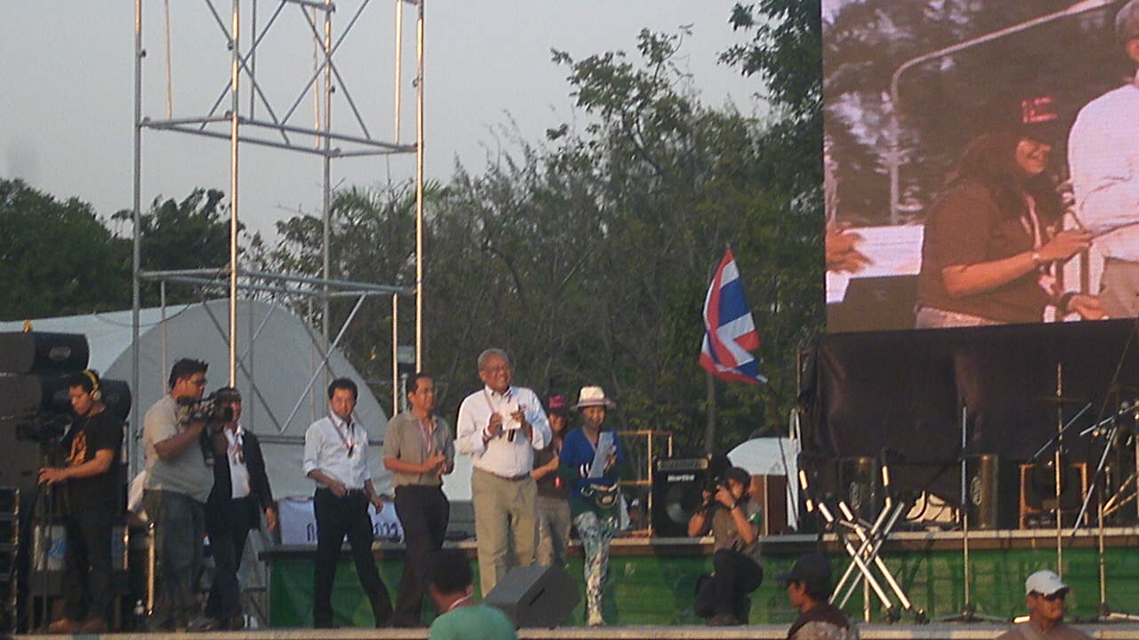 Protestführer Suthep bei einer Rede am Lumpini Park